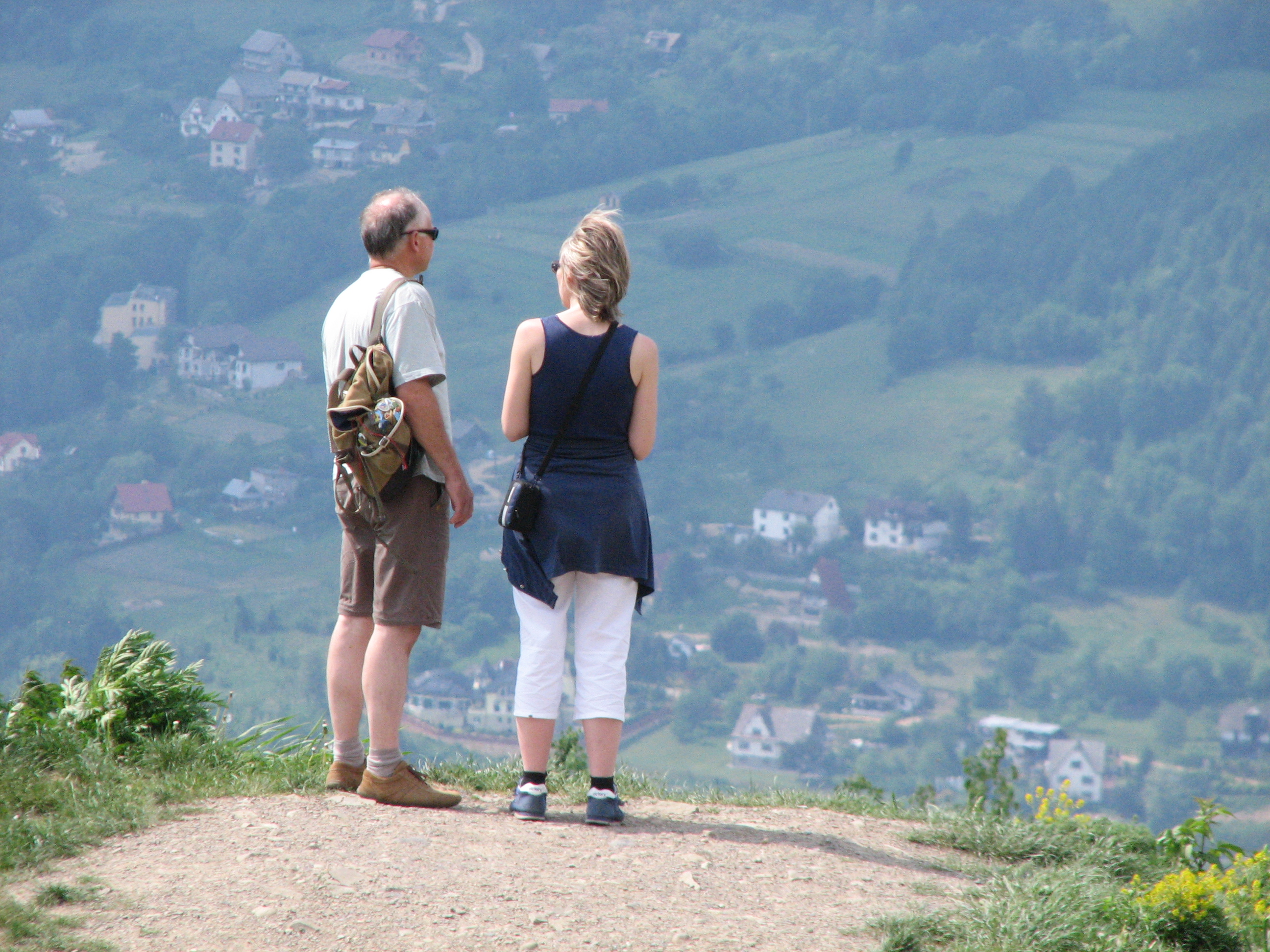 WIDOK Z GÓRY ŻAR.